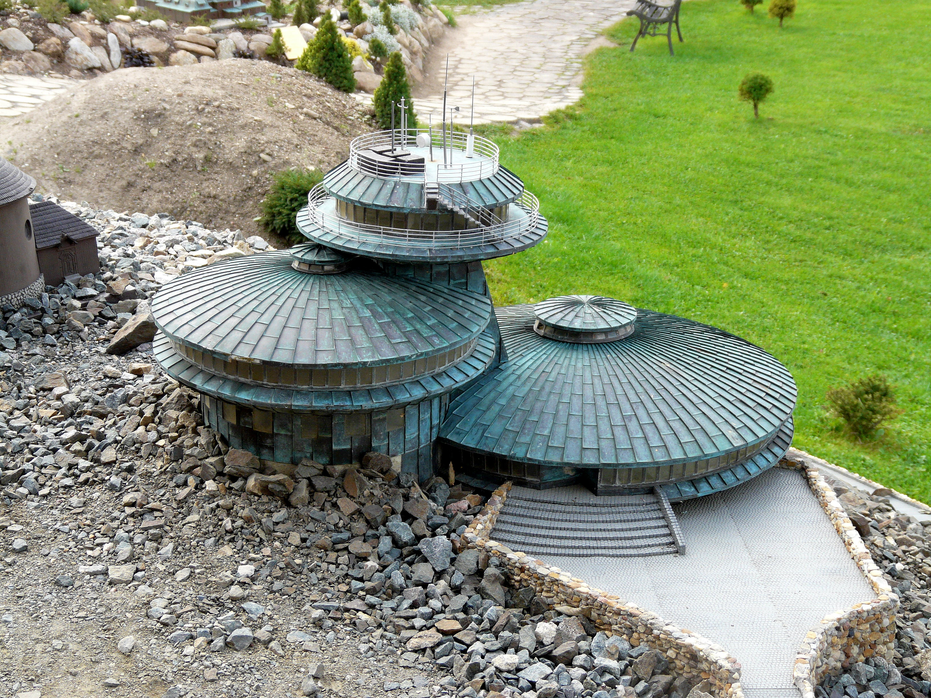 miniatura schroniska i obserwatorium na Śnieżce w Parku Miniatur Zabytków Dolnego Śląska w Kowarach